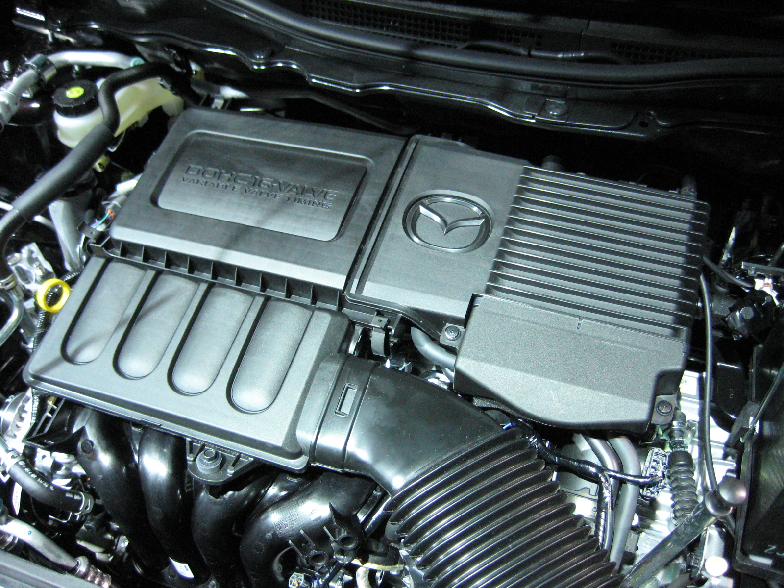 Mazda ZY-VE 1.5L MZR Engine in 2007 Mazda Demio